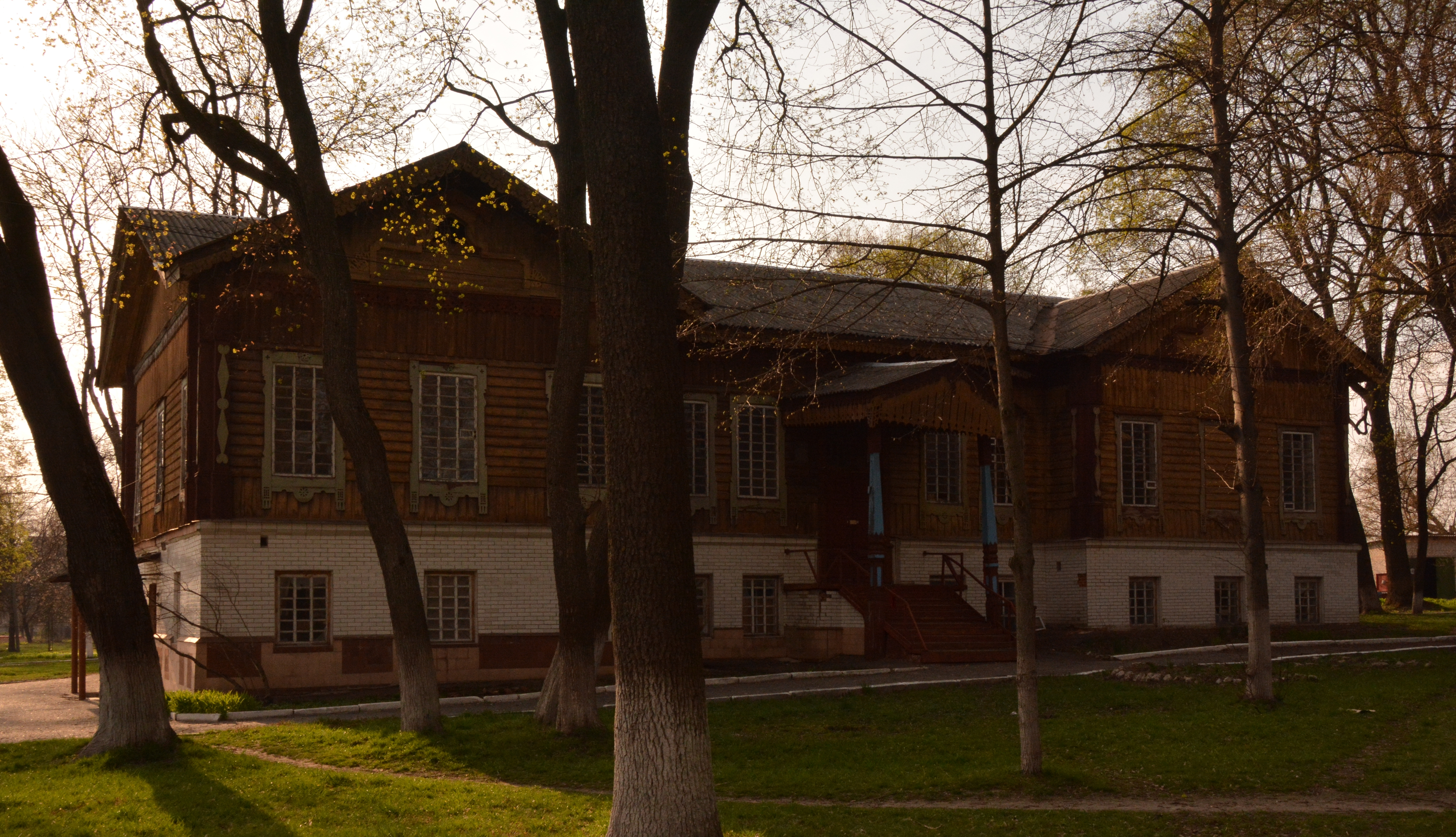 Корпус чоловічий, Глухів, вул. Інститутська, 3